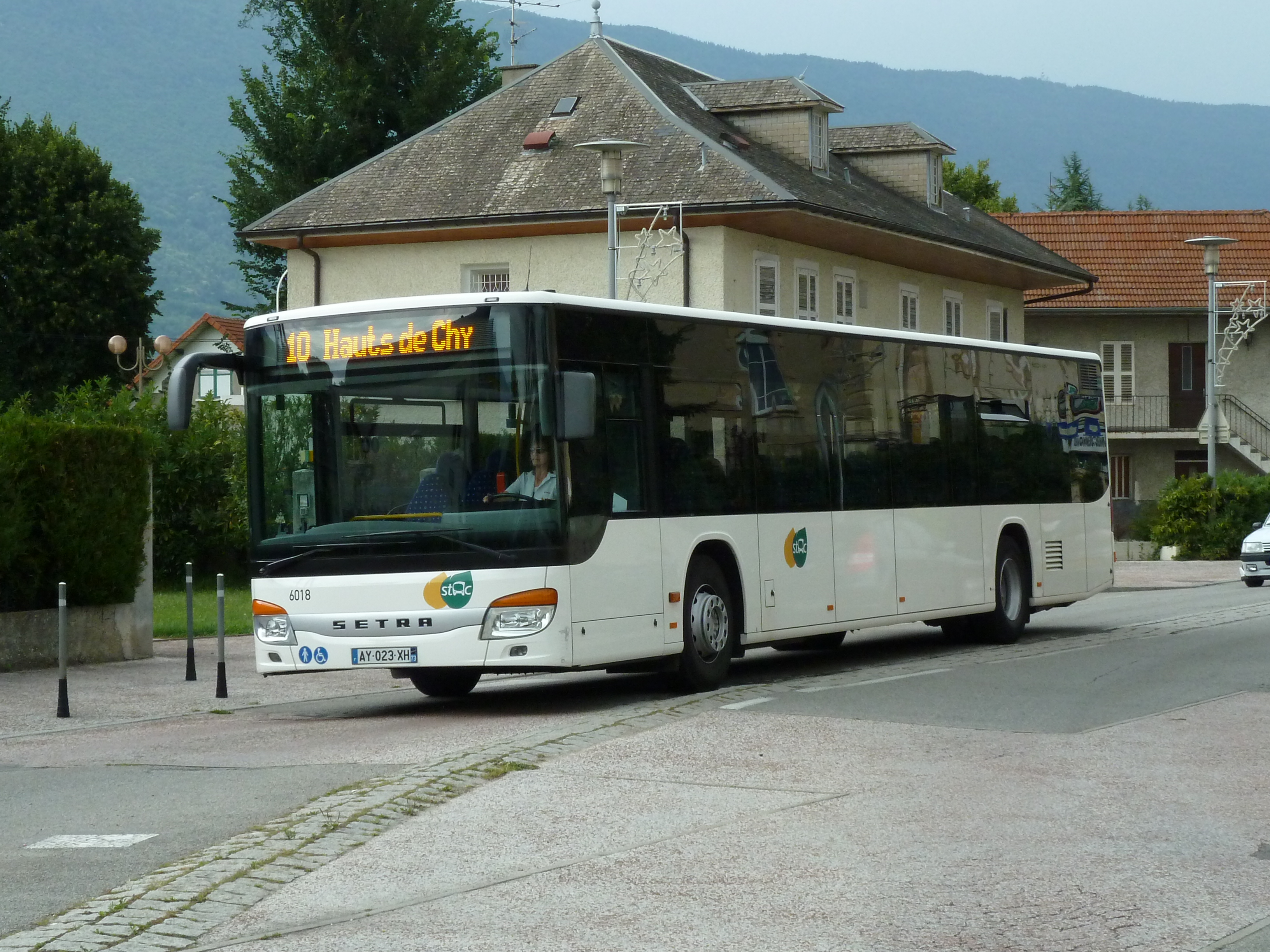 The Setra S 416 NF n°6018 of Frossard, on the line 10 of the Stac (De Gaulle, La Motte-Servolex↔Hauts de Chambéry, Chambéry) — in La Motte-Servolex, France — on June 21, 2011.